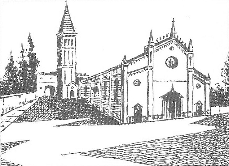 Il complesso della basilica dei Santi Gervasio e Protasio nel XVIII secolo in una stampa di Gio Bono Ferrari, Rapallo, Liguria, Italia